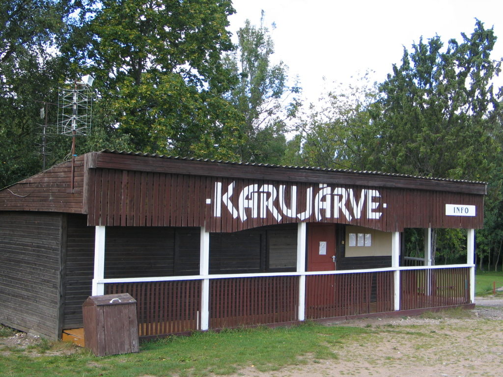 Karujärve kämpingu infolett